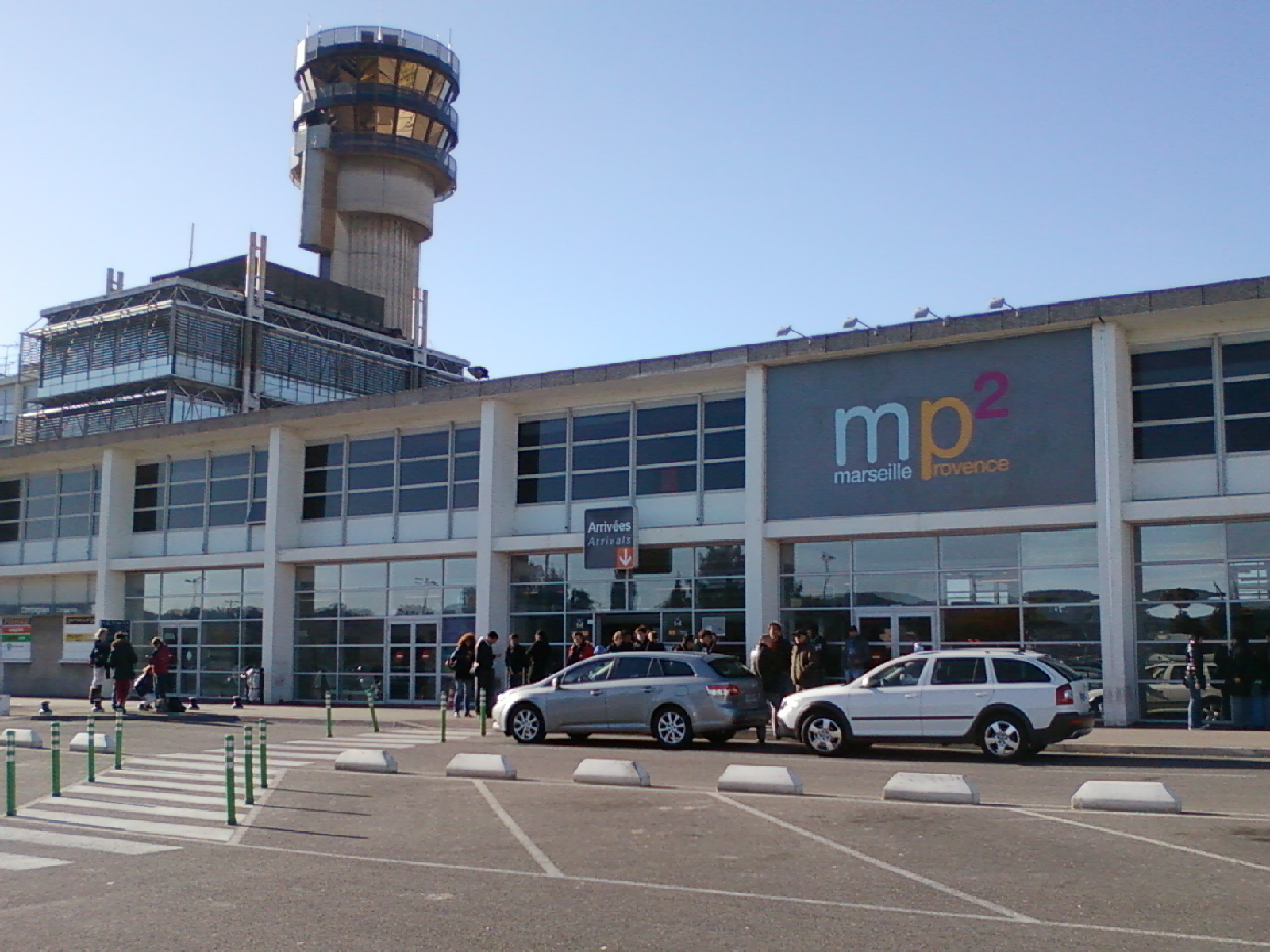 Entrée de l'aéroport Marseille-Provence